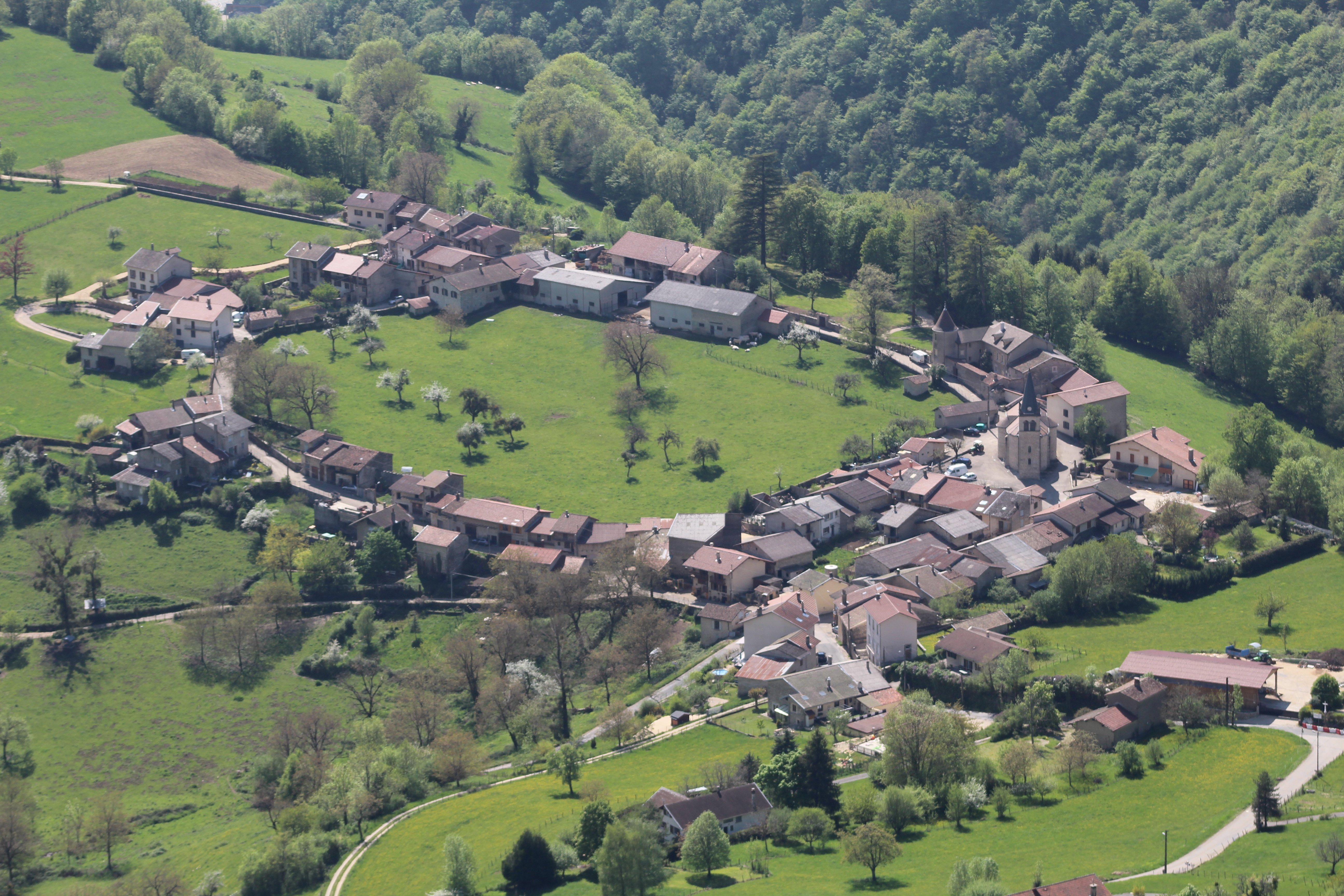 Vue d'Oncieu depuis les hauteurs.